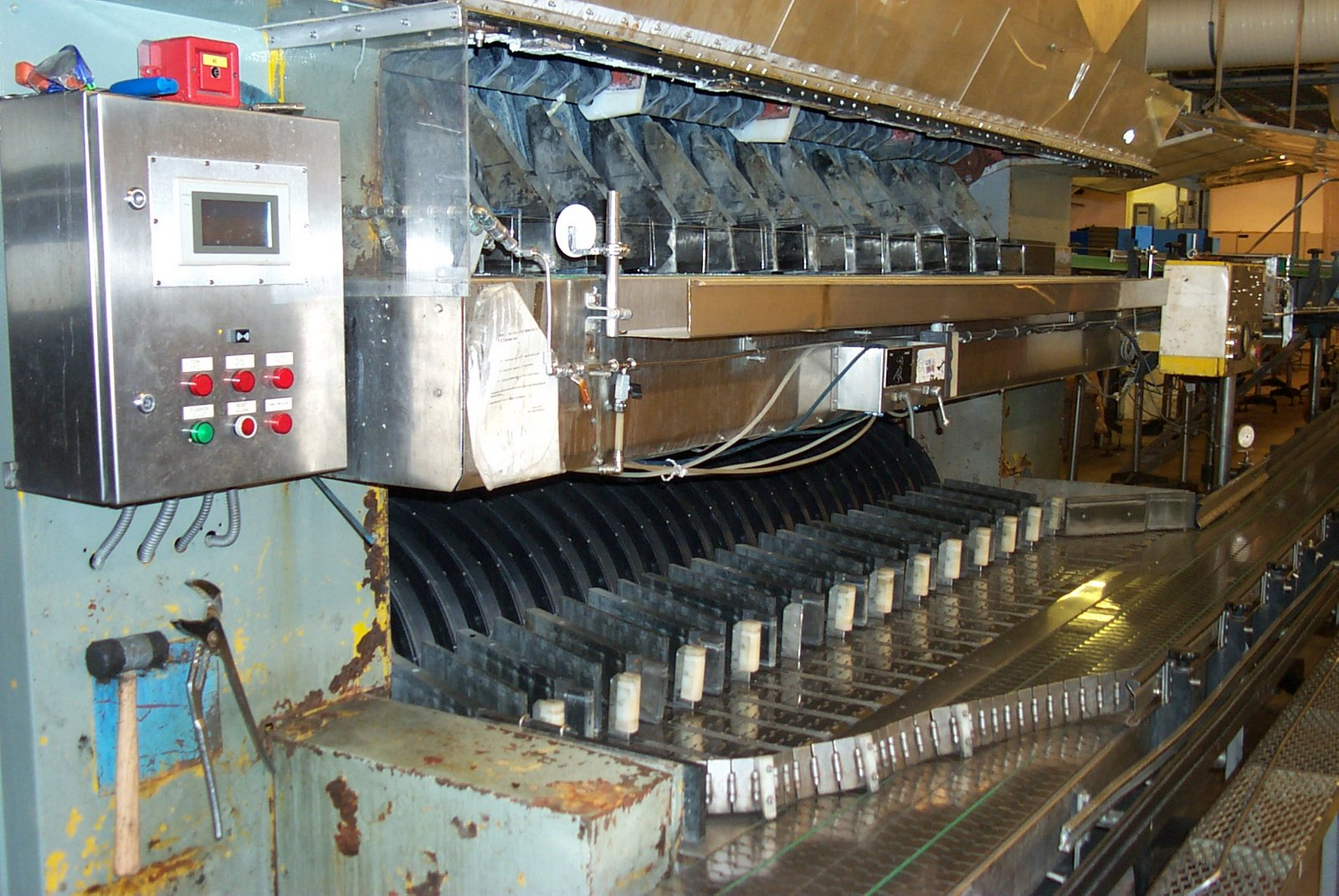 Bilde fra tapperiet på tidligere Nordlandsbryggeriet.